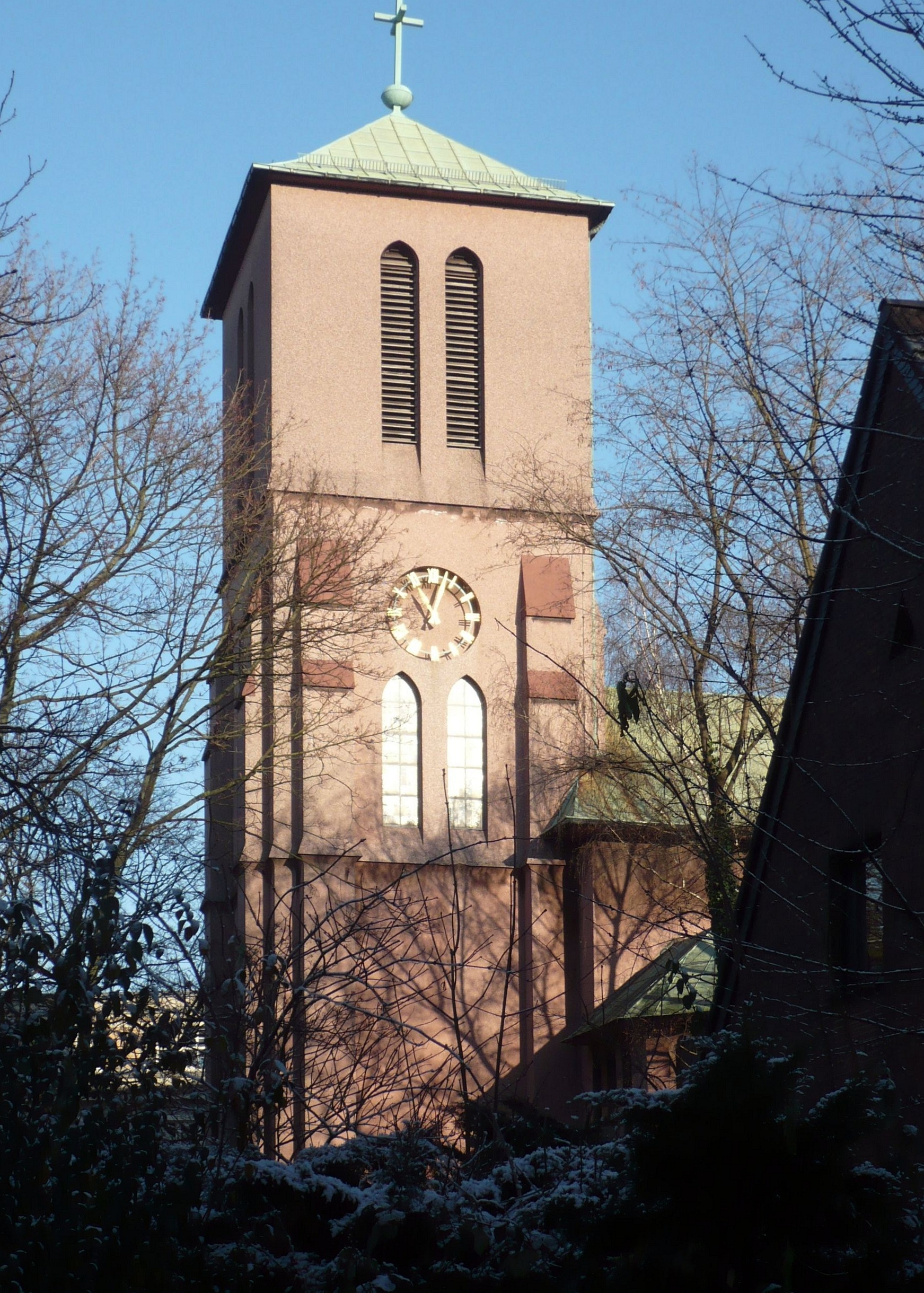 Lutherkirche in Essen, Deutschland